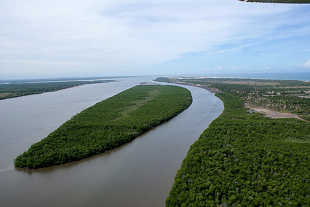 Vista aérea da APA de Mangue Seco, Bahia.